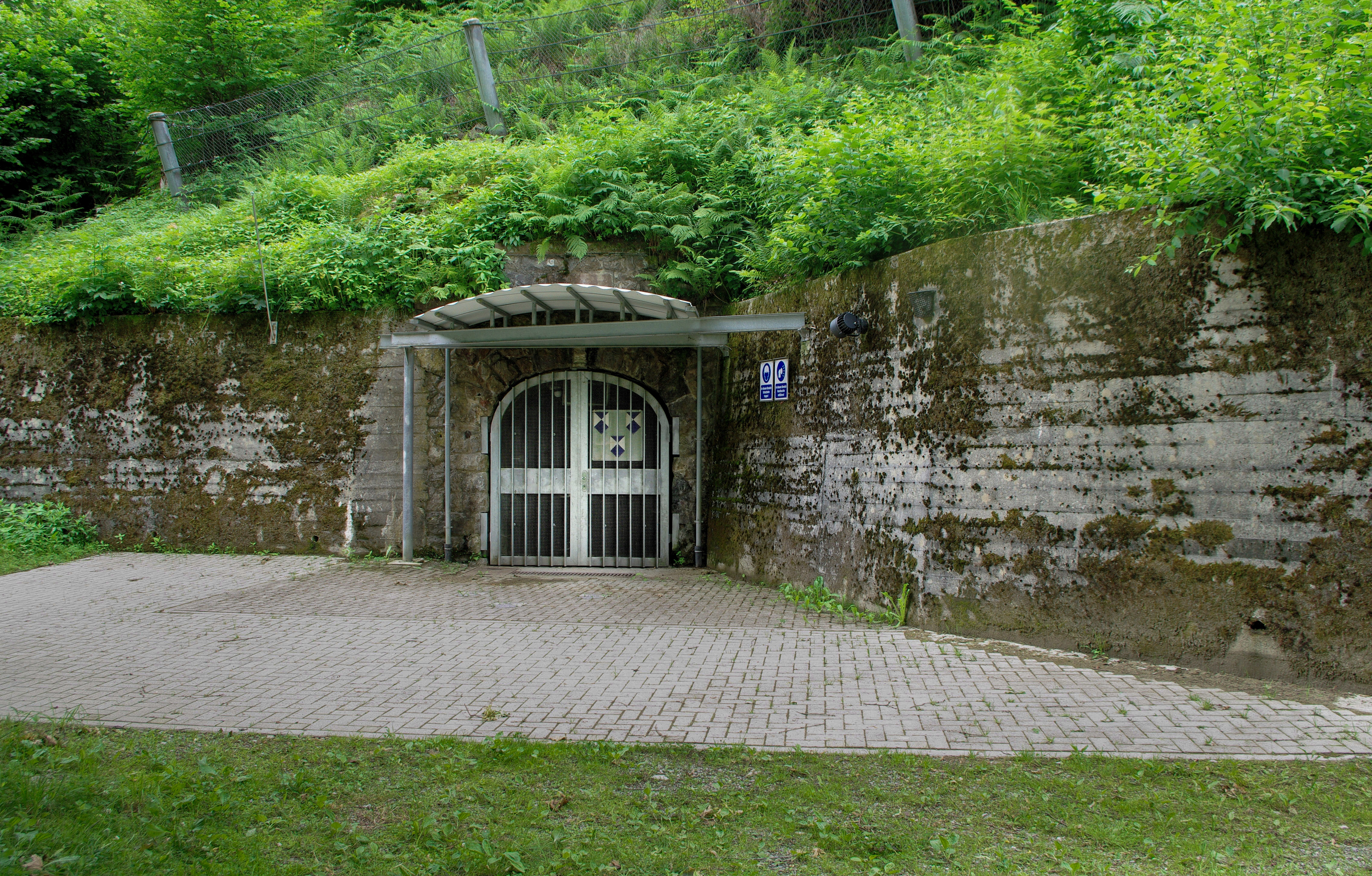 Der Barbarastollen, auch als Oberriedstollen bezeichnet, ist ein stillgelegter Versorgungsstollen des ehemaligen Schauinsland-Bergwerks bei Oberried in der Nähe von Freiburg im Breisgau. Er dient seit 1975 als Zentraler Bergungsort der Bundesrepublik Deutschland zur Lagerung von fotografisch archivierten Dokumenten mit hoher national- oder kulturhistorischer Bedeutung.